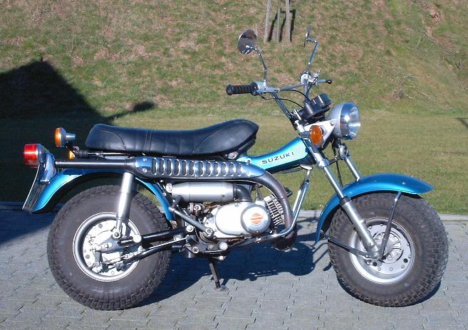 Suzuki RV 90 Bj.1976